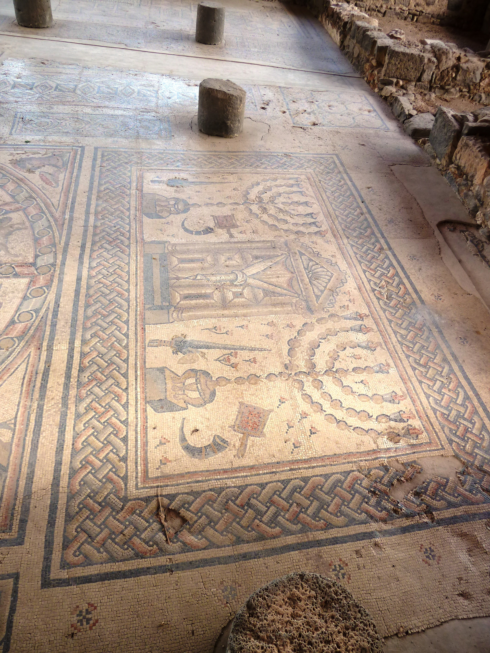 חמת טבריה הוא אתר ארכאולוגי וגן לאומי על שפת הכנרת, ליד טבריה, הידוע בעיקר בשרידי בית הכנסת שנתגלו בו.